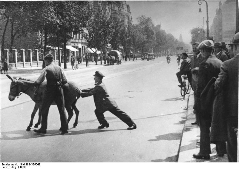 Berlin, störrischer Esel Scherl: Tiefsinnige Tierfabel in Charlottenburg. 1936 4263-36 [Berlin]